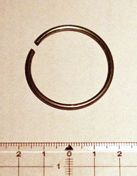 Ein Sprengring zur Befestigung eines Fahrradritzels an der Hinterachse